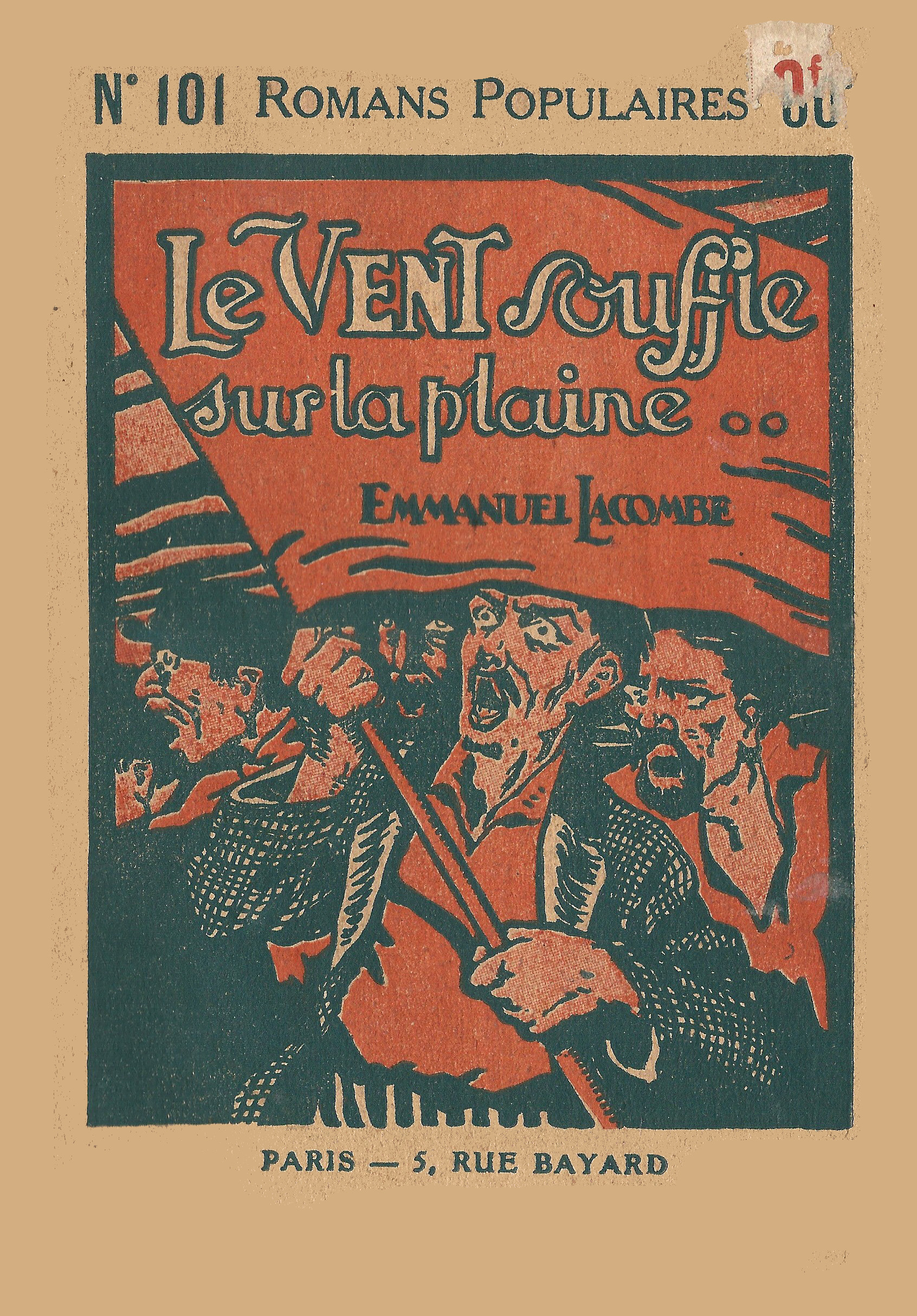 Couverture de l'ouvrage : Le Vent souffle sur la plaine, d'Emmanuel Lacombe, collection Romans populaires, éditions Bayard, s.d. (1921), 96 pages.